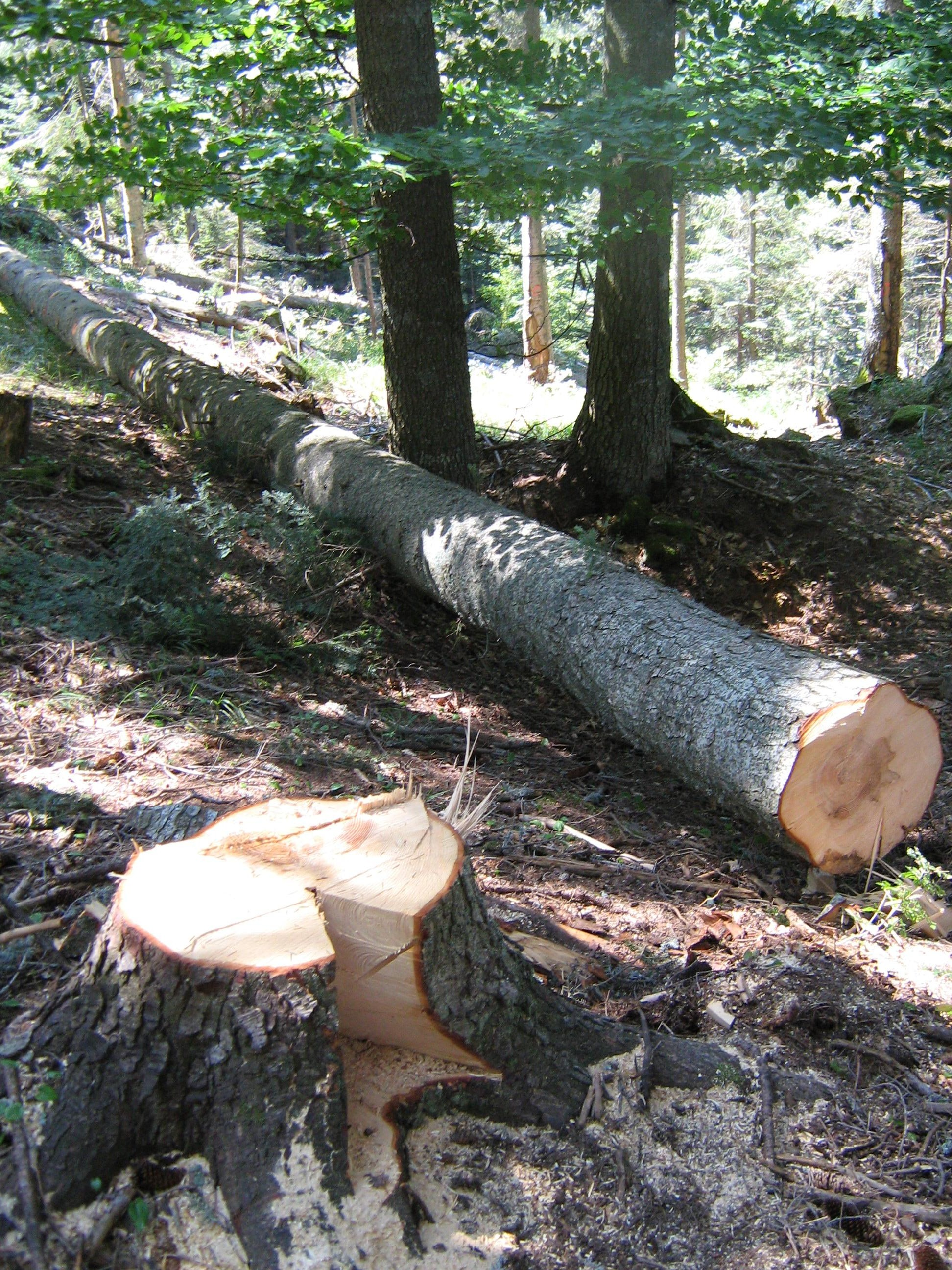 Tala de arbol de Abeto blanco